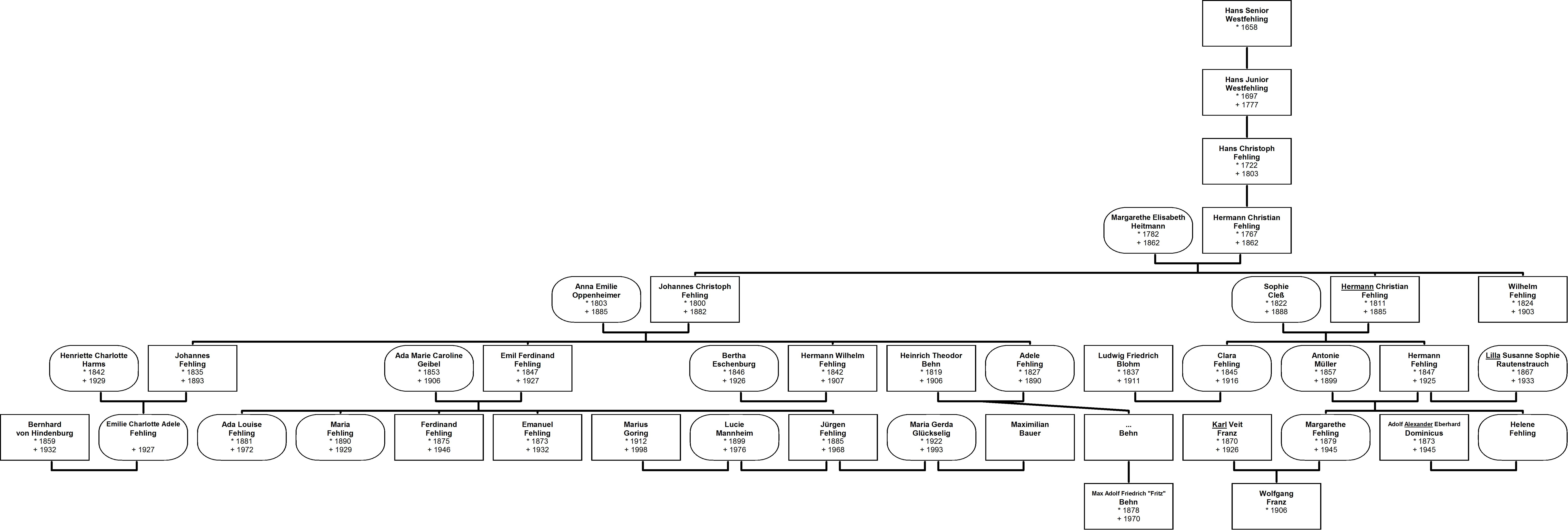 Die Familie Fehling aus Lübeck, aus der unter anderem Kaufmänner und Politiker stammen.